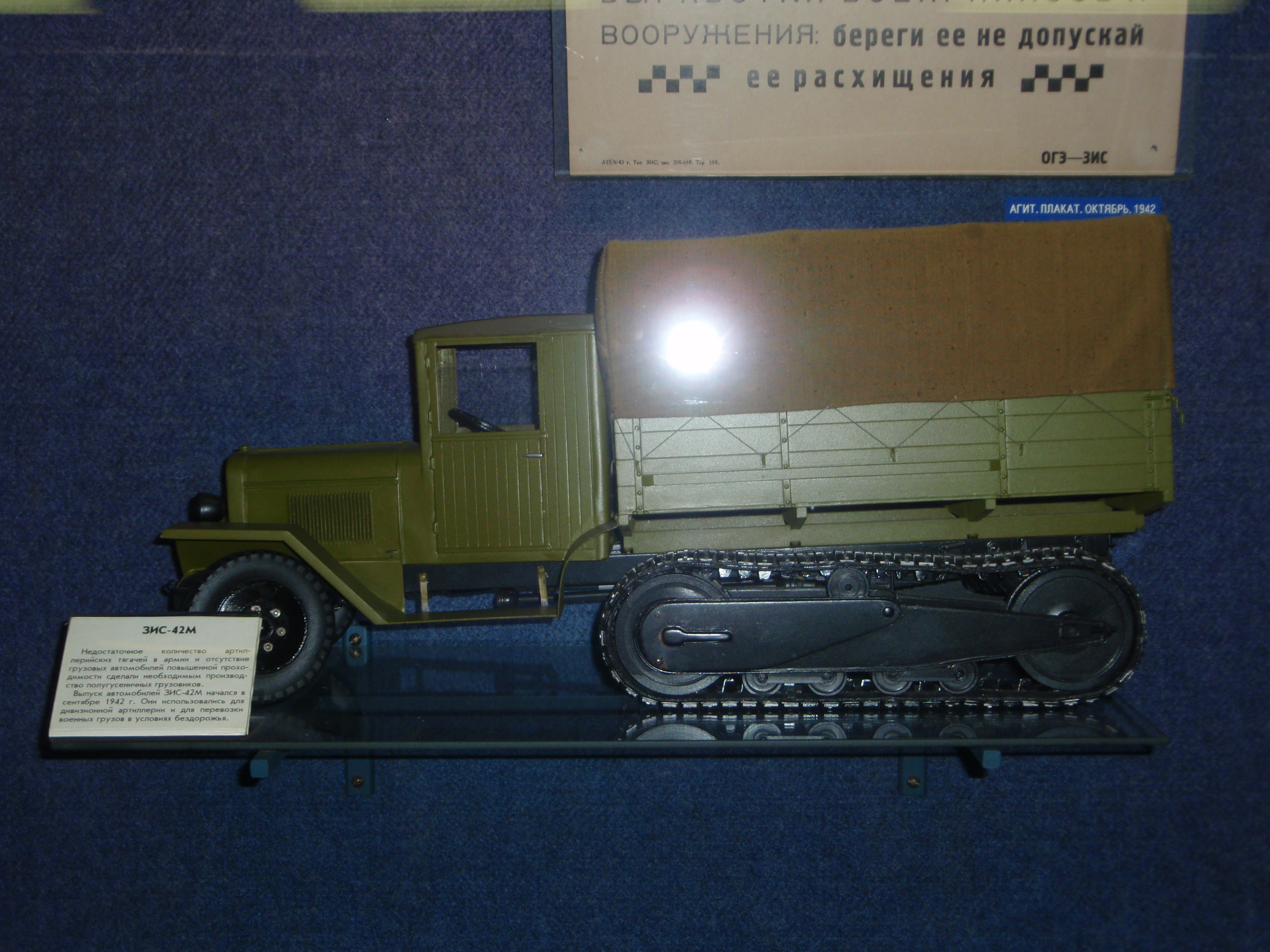 Советский грузовик ЗИС-42М (модель), Государственный Политехнический музей (г.Москва)